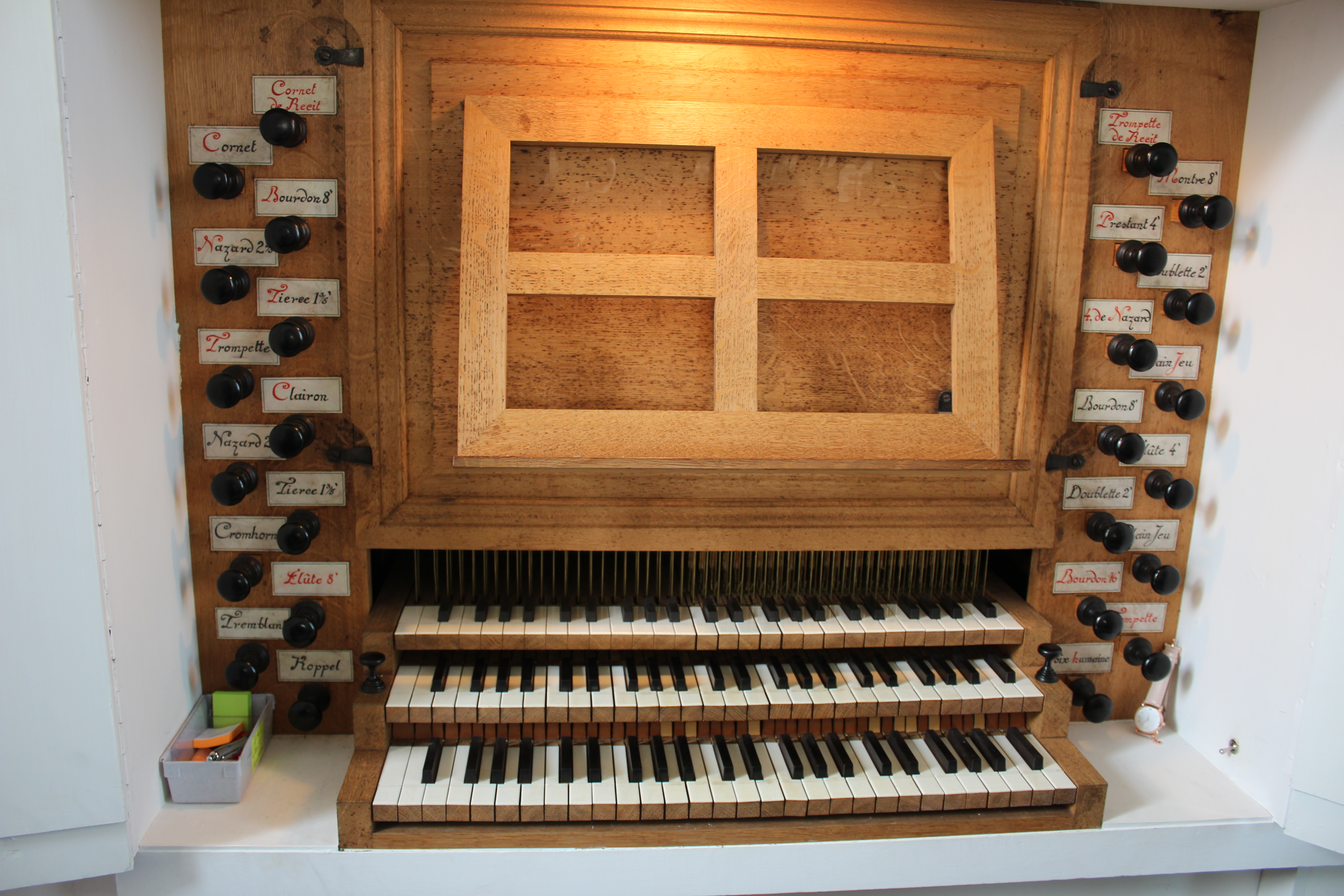 Ev.-reformierte Kirche Stapelmoor, Weener, Ostfriesland, Niedersachsen, Deutschland